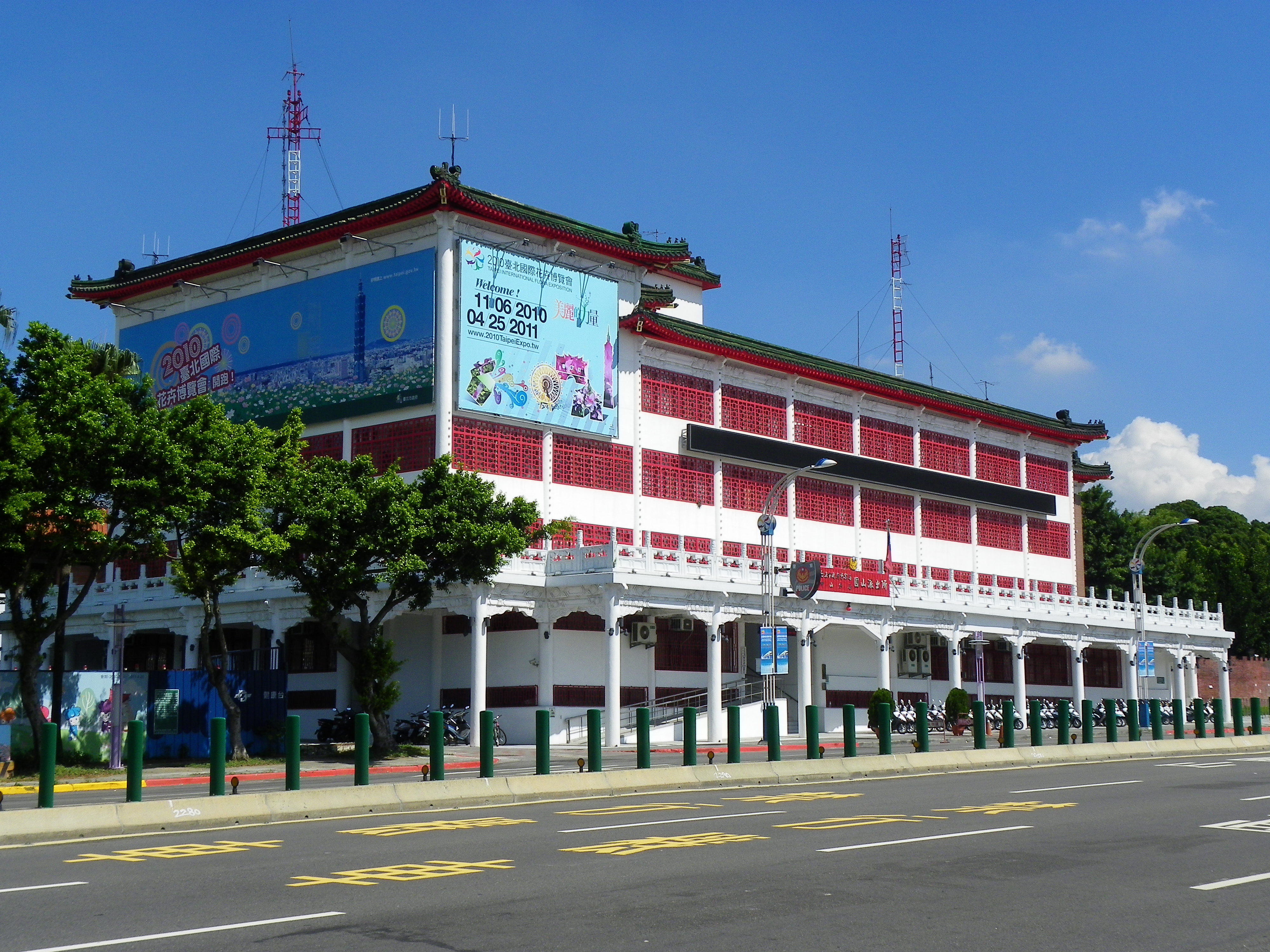 台北市政府警察局円山派出所と台北ラジオ放送、所在地：台北市中山区中山北路三段62号。